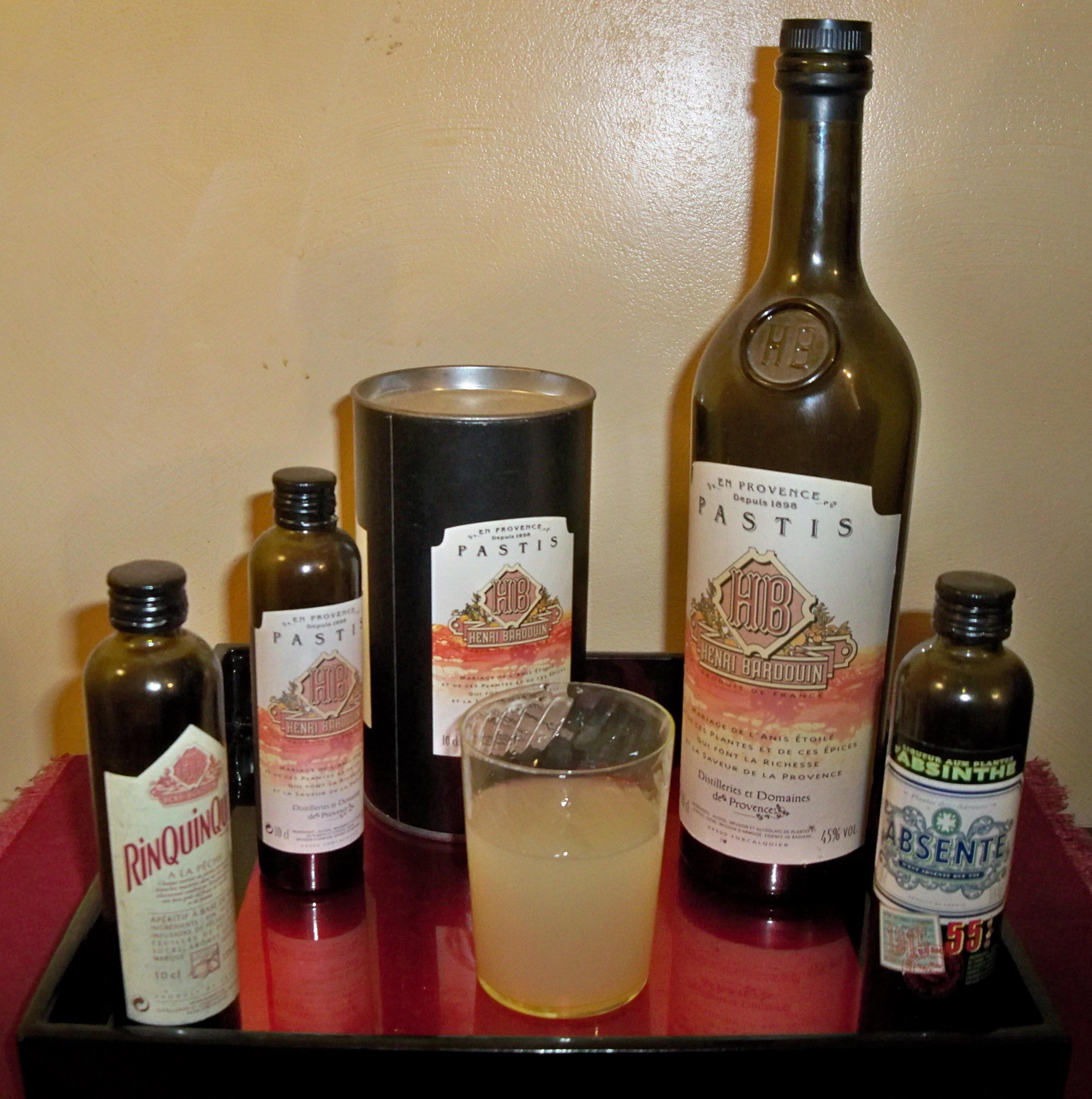 Pastis des Alpes de Haute Provence